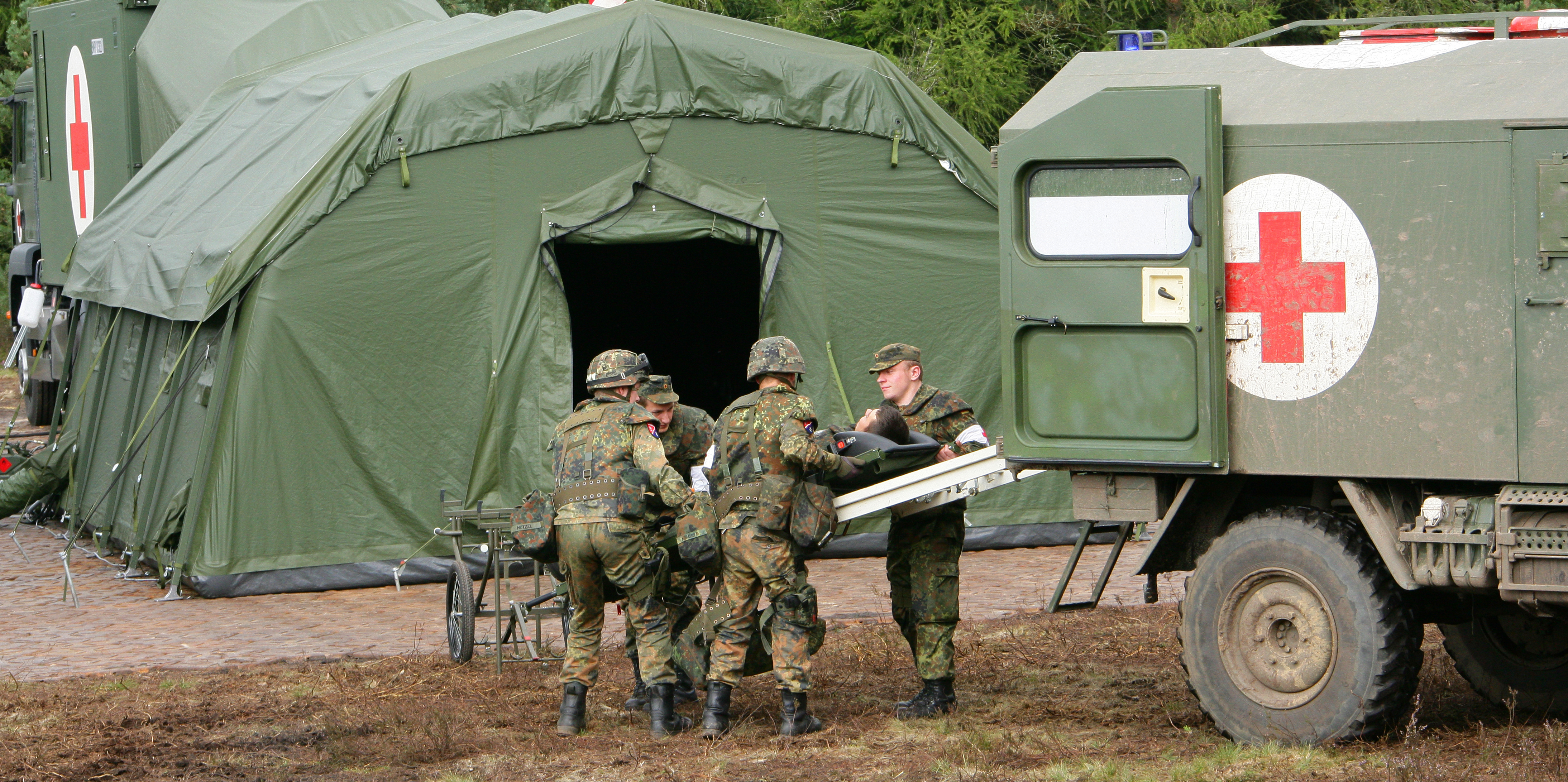 Einlieferung eines Verwundeten mit Krankenkraftwagen (Rad) in eine Rettungsstation im Rahmen des Vorübens zur Informationslehrübung Heer am Ausbildungszentrum Munster. ©Bundeswehr/Rott